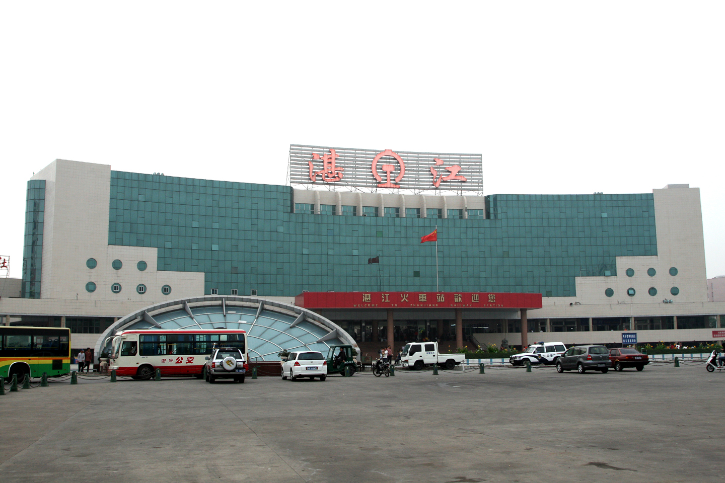 黎湛铁路湛江站